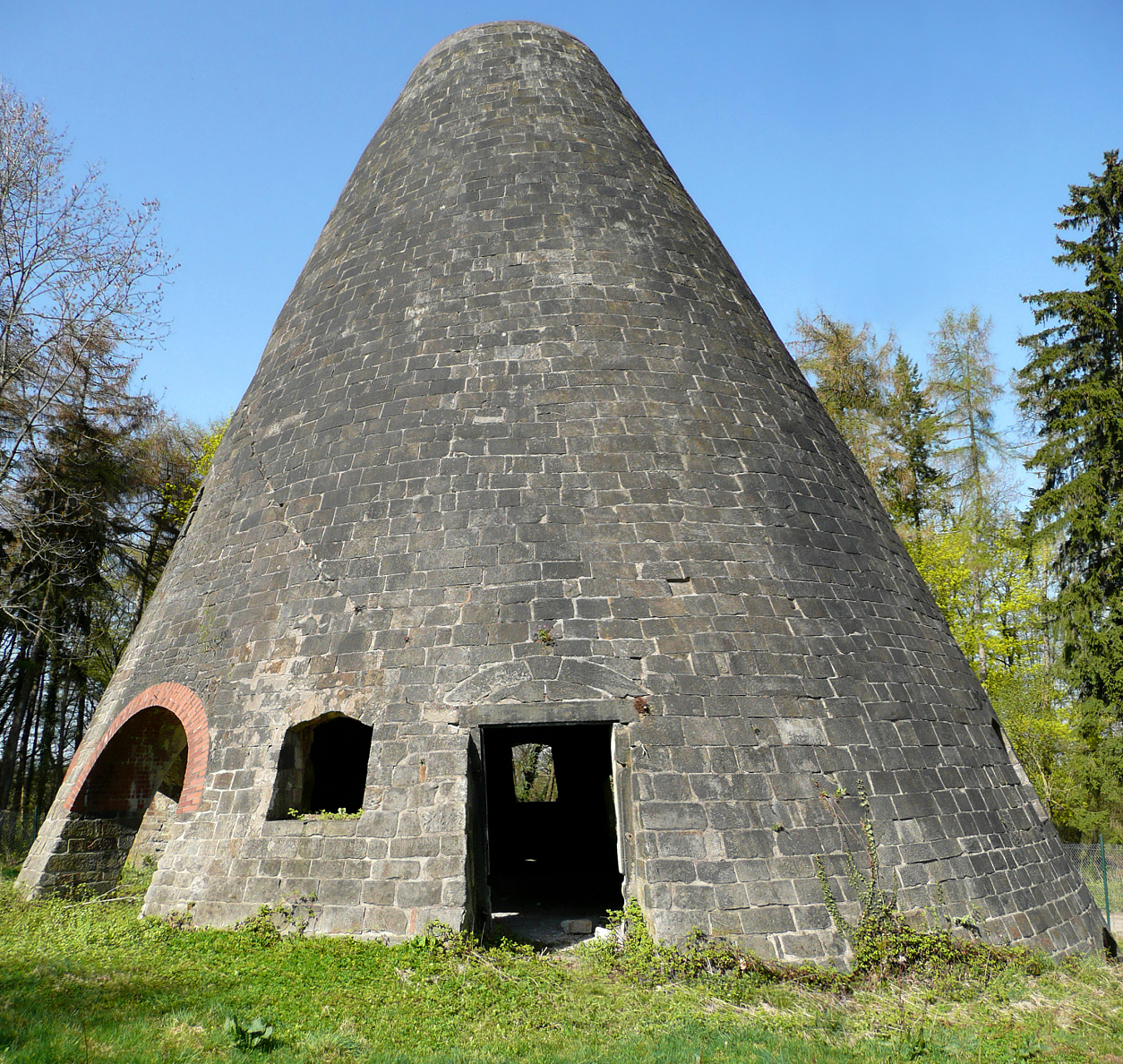 Glashüttenturm Steinkrug